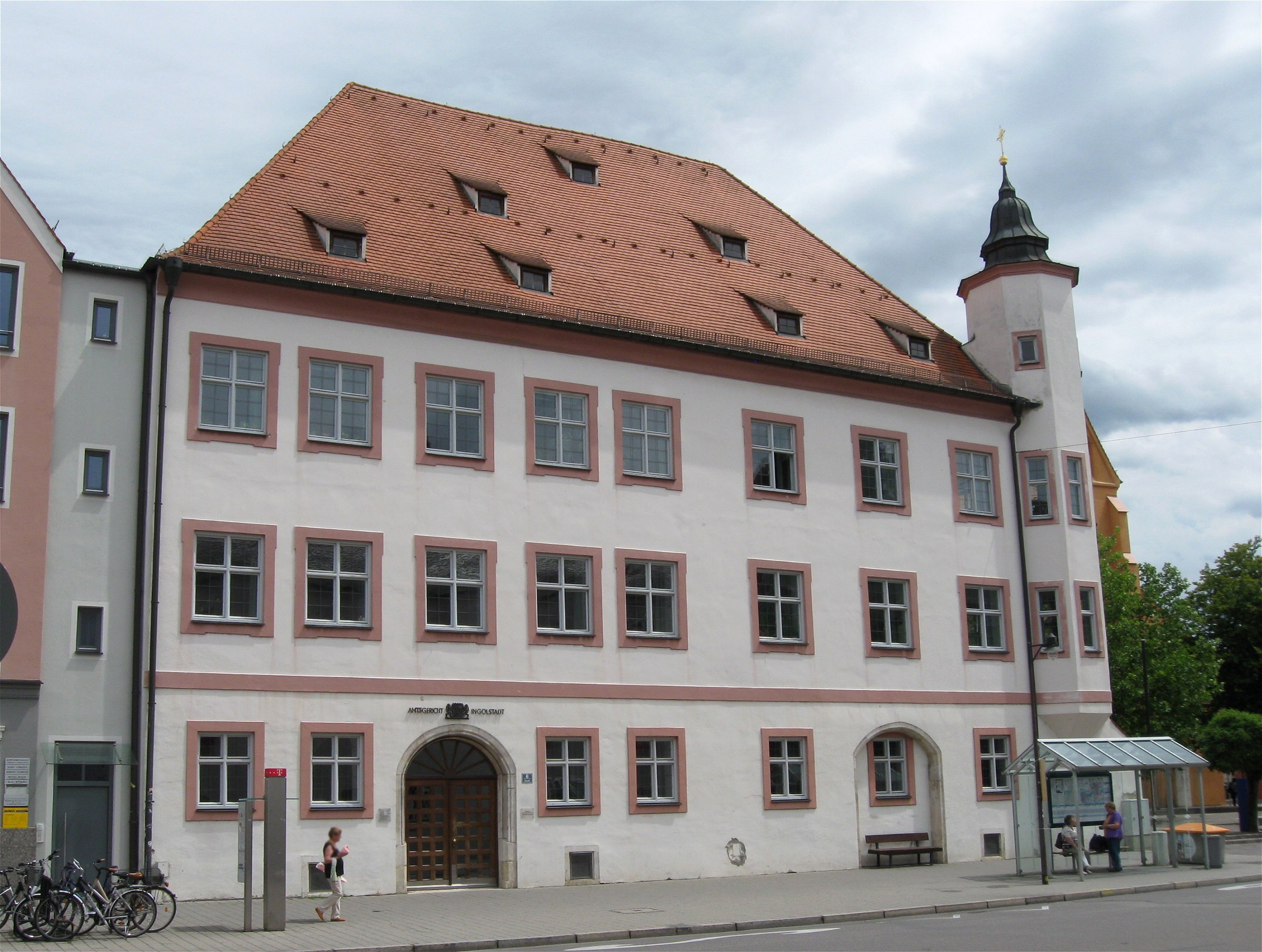 Harderstraße 6; ehemaliger Stadtpalast der Fugger, dann Stadthaus des Klosters Kaisheim und Sitz der Festungsbau-Direktion, sog. Kaisheimer Haus, dreigeschossiges Eckhaus mit Walmdach und polygonalen, von Zwiebelhauben bekrönten Eckerkertürmchen, im Kern auf drei gotische Häuser zurückgehend, um 1600 ausgebaut und im 17./18. Jahrhundert barock überformt, Fassaden 1962 verändert. D-1-61-000-164